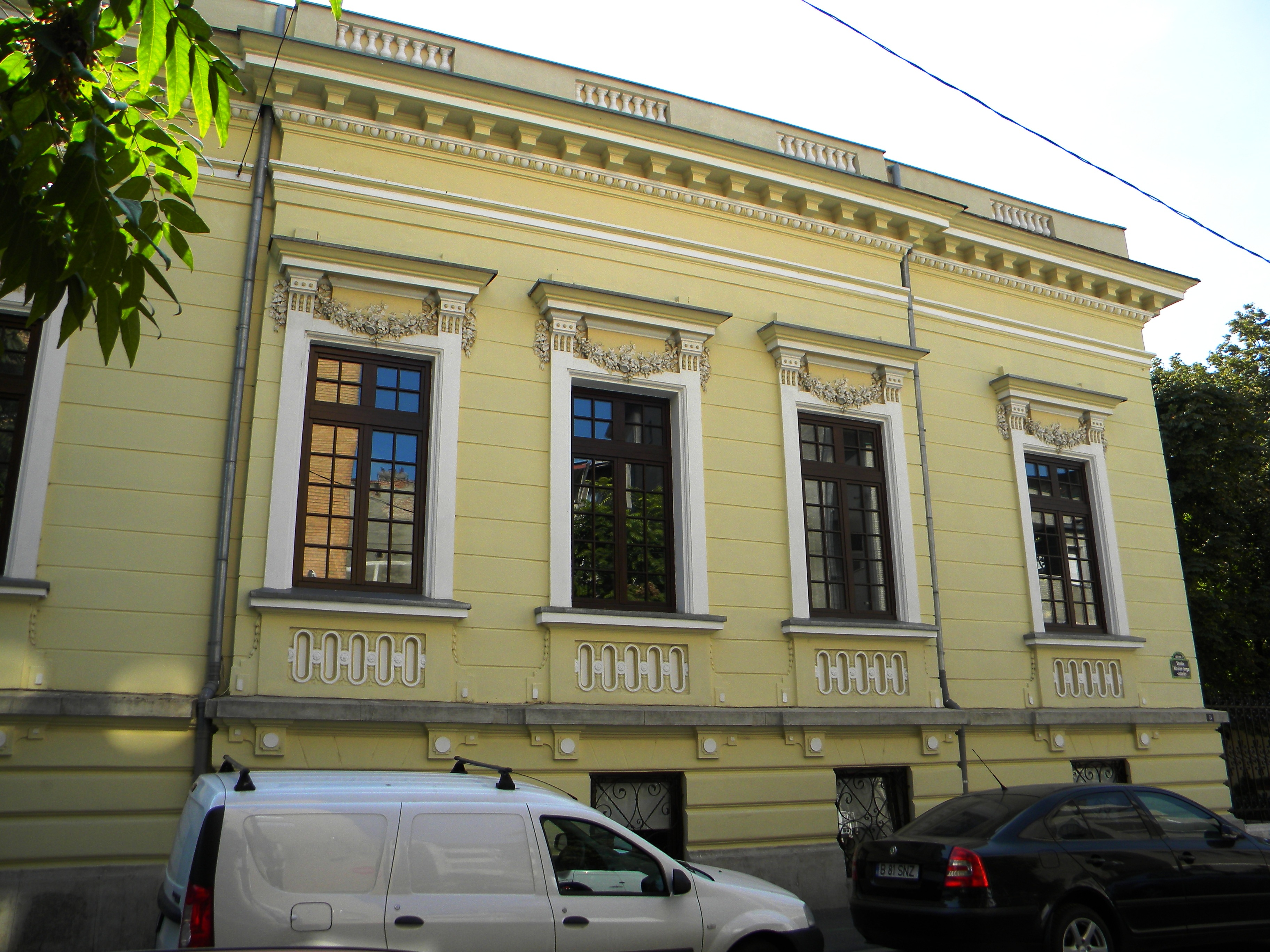 Bucuresti, Romania, Casa Pillat pe Str. Nicolae Iorga nr. 8, sect. 1 (alta imagine)